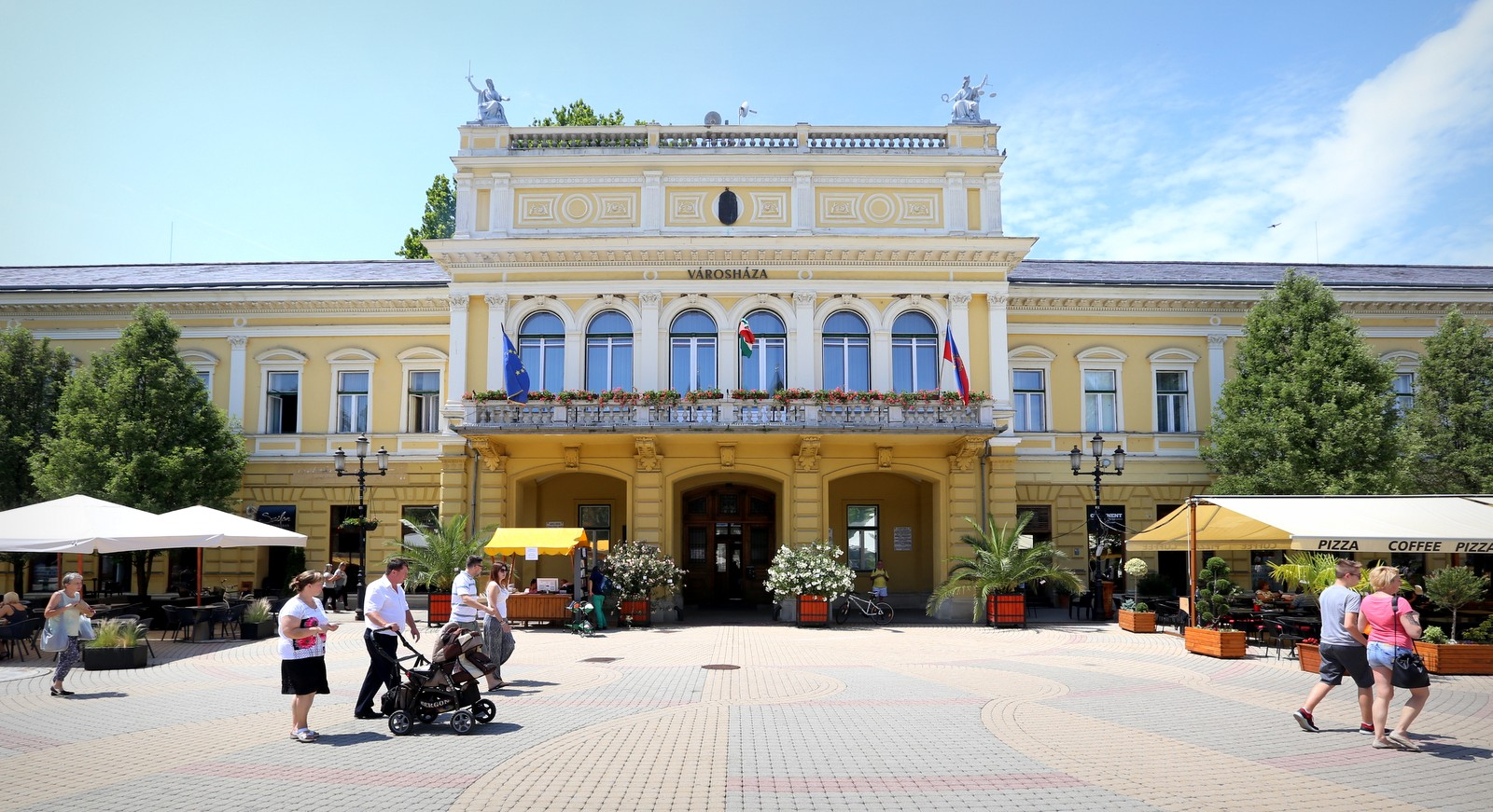 Nyíregyháza, Városháza